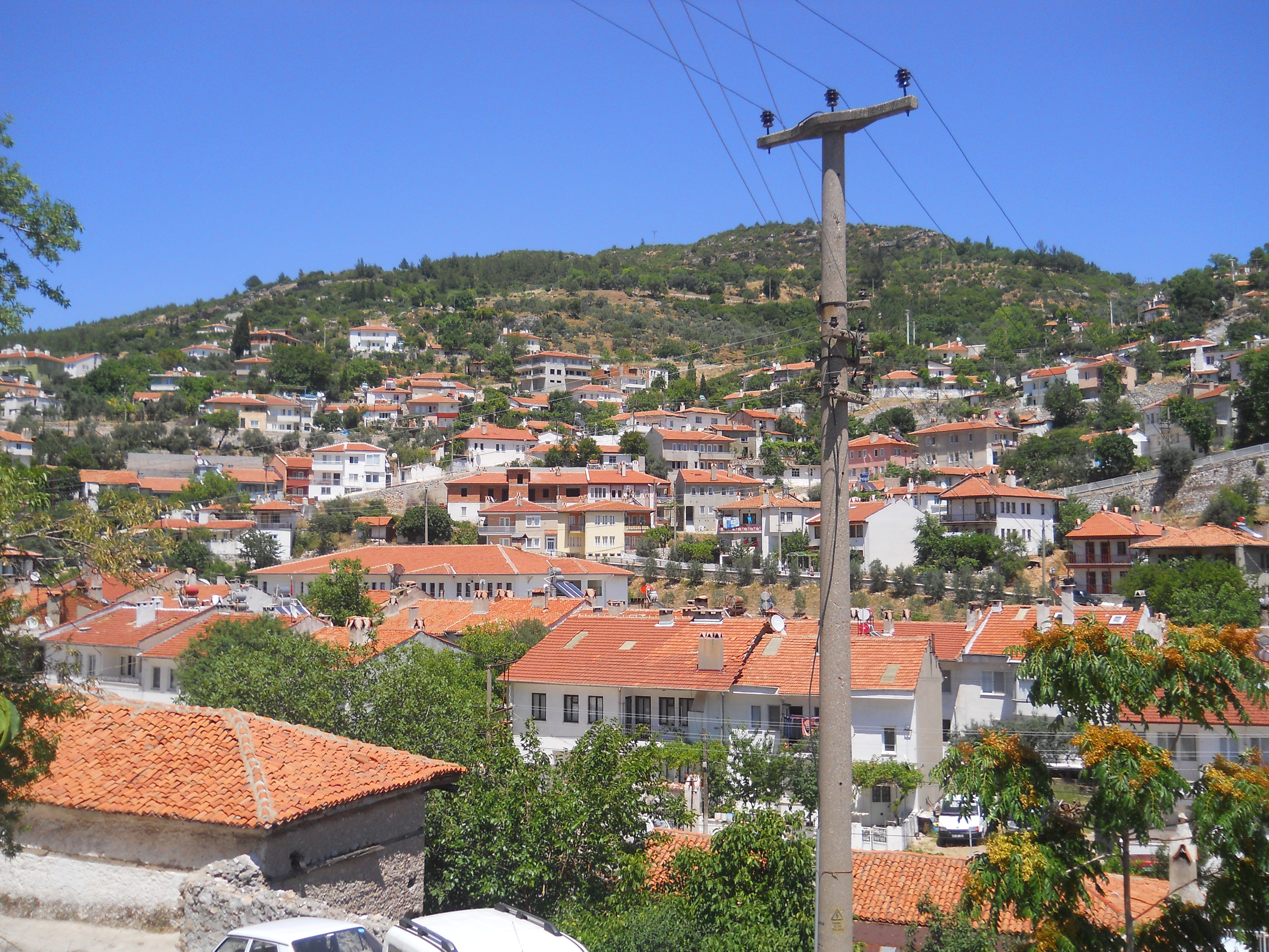 Muğla 99